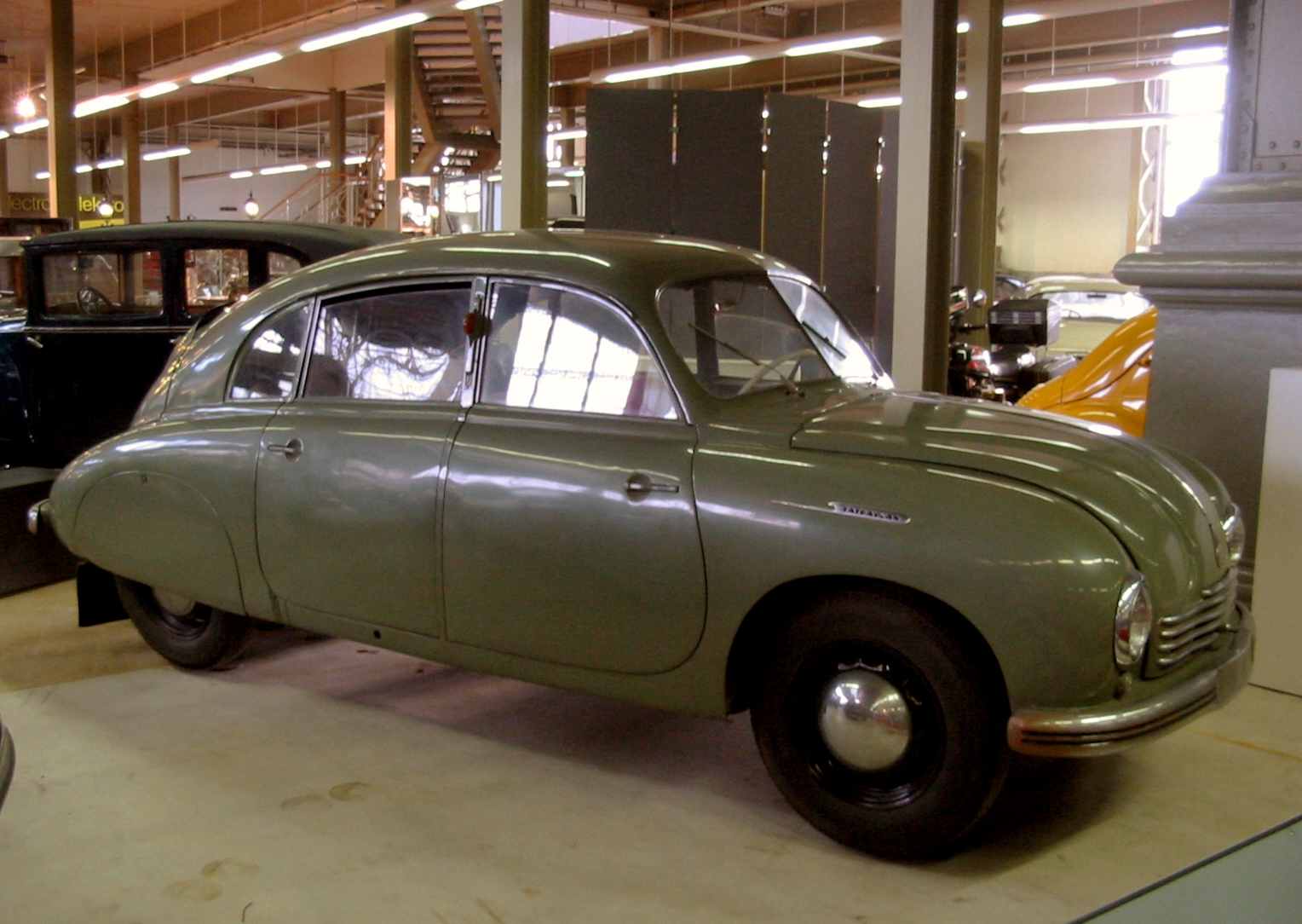 1951 Tatra T600 Tatraplan